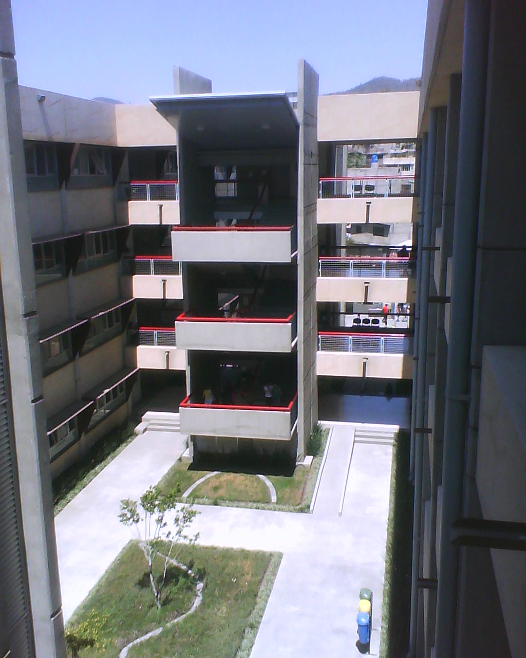 Al Interior de la Universidad Atónoma de la Ciudad de México, Campus Cuautepec